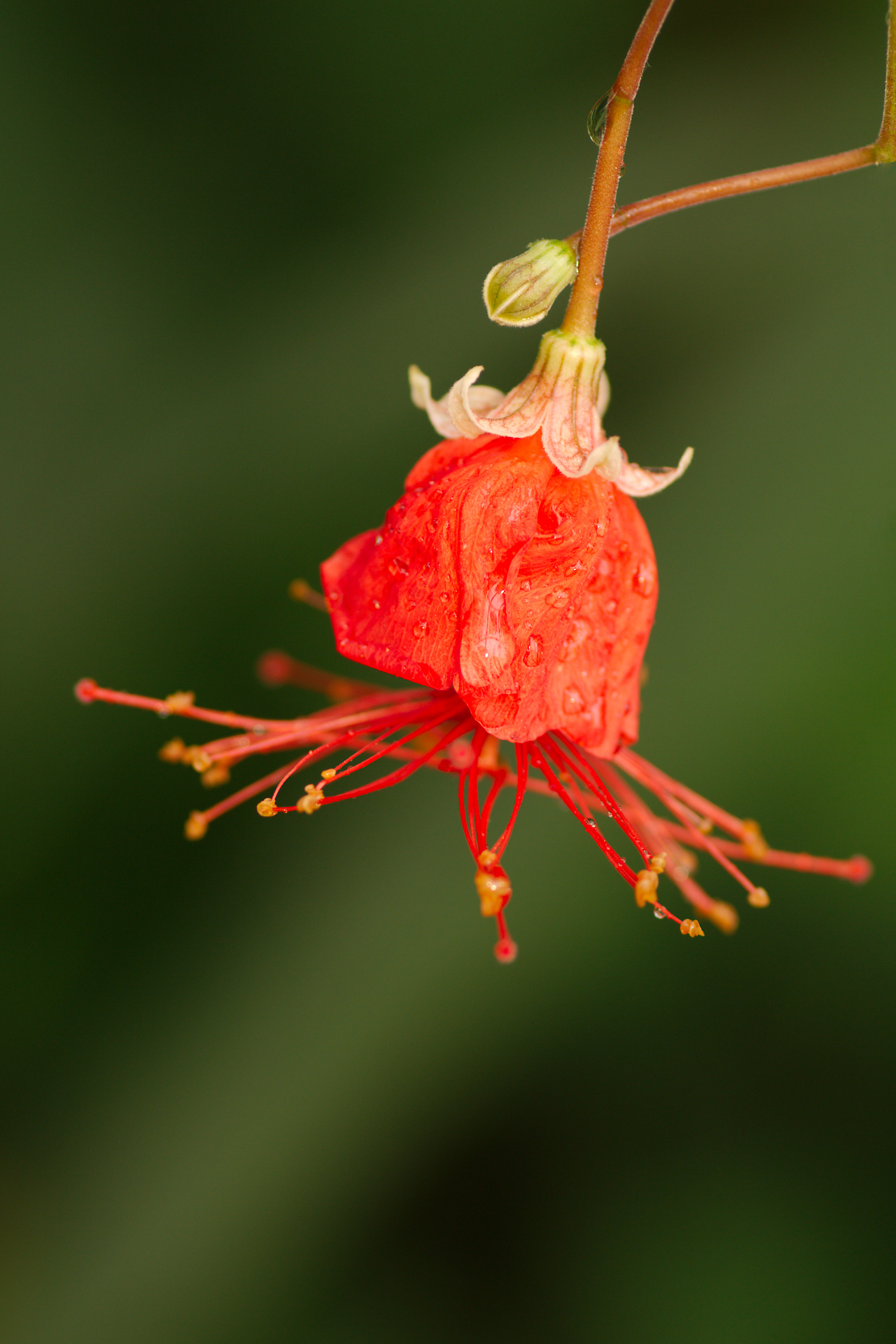 Snímek byl pořízen během "Fotografickéh workshopu v Botanické zahradě Fata Morgana", Praha, 15. prosince 2012.